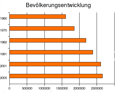 Bevölkerungsentwicklung Jamaikas seit 1960